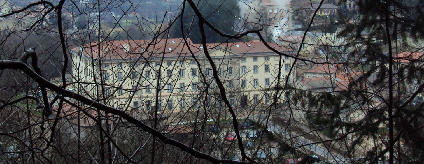 Prise de vue, façade Ouest, de l'ancienne Abbaye Cistercienne de la Séauve sur Semène.